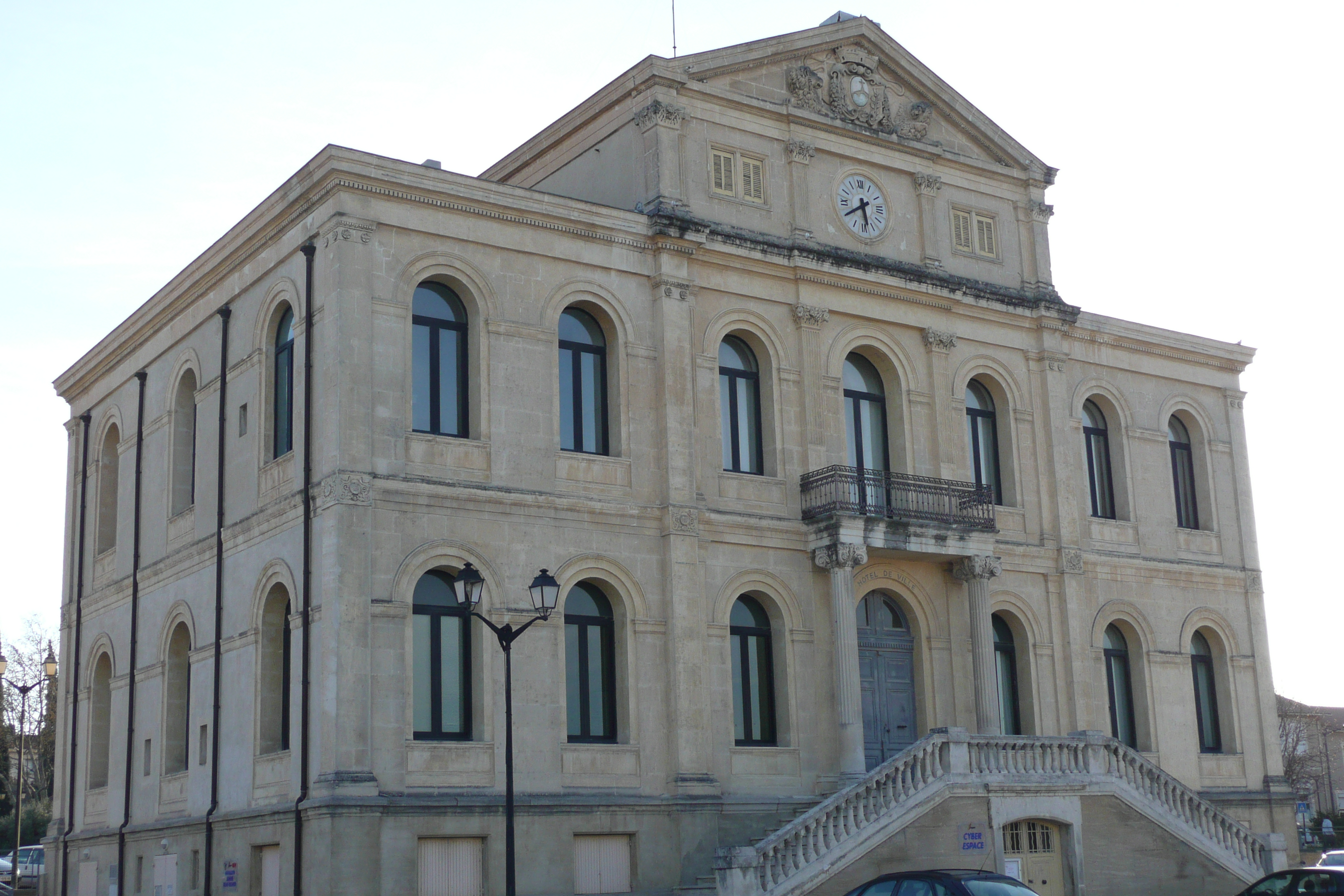 ancien Hôtel de ville à Sorgues.